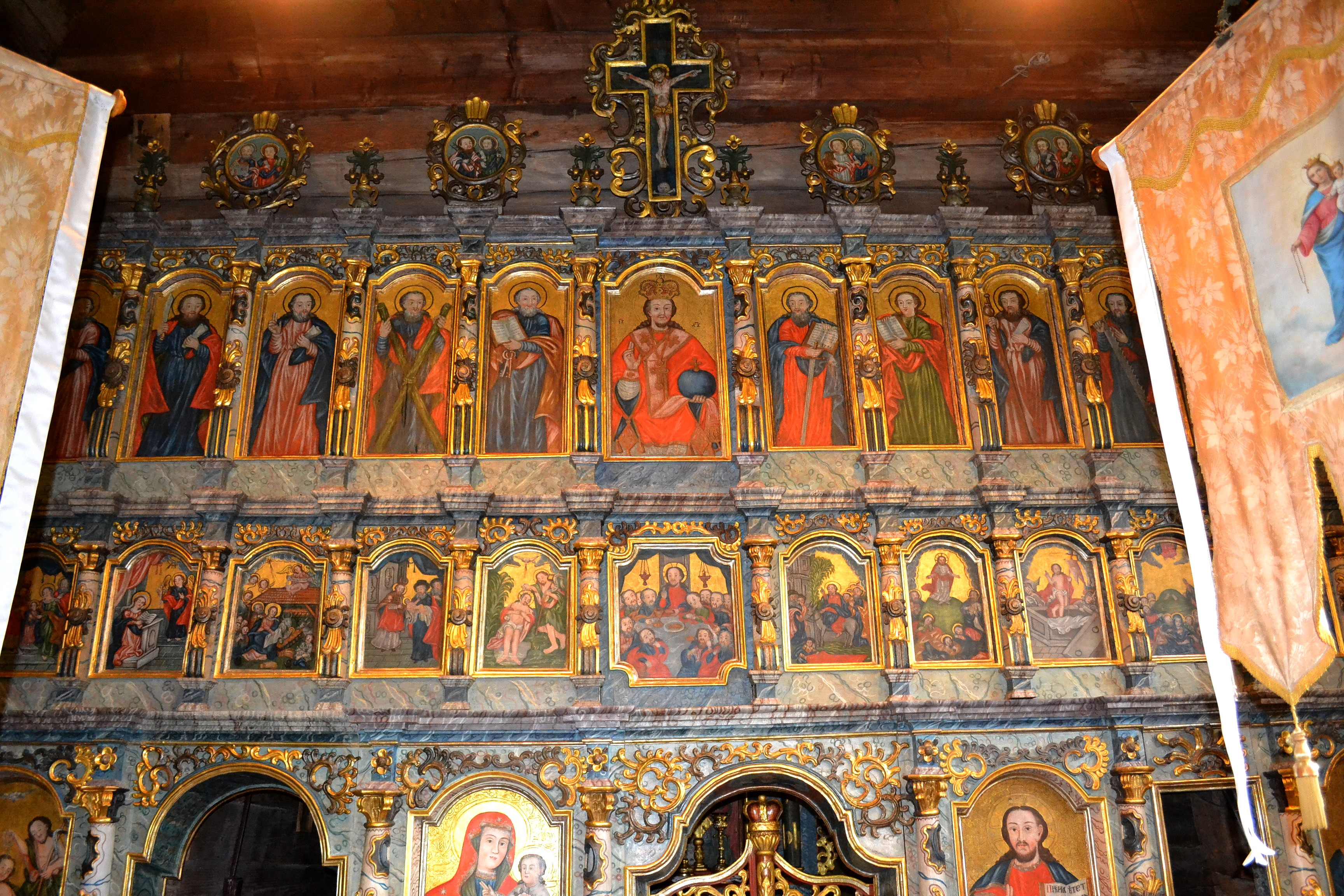 Bodružal (okr. Svidník), Chrám svätého Mikuláša; ikonostas